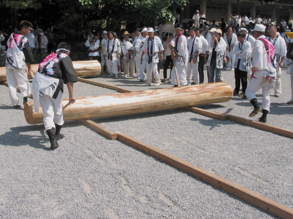 Okihikigyoji(Kawabiki Naiku) in front of Sanshuden Naiku 御木曳行事（内宮領・川曳）三重県伊勢市宇治館町の皇大神宮（伊勢神宮内宮）参集殿前にて撮影